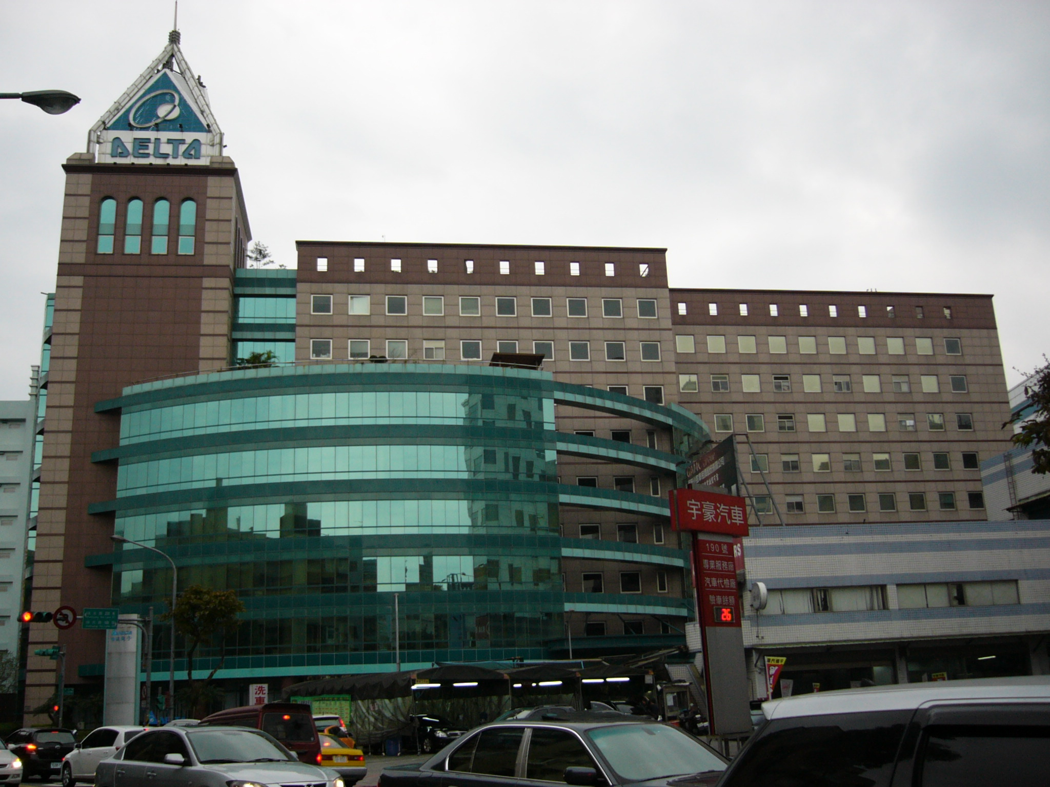 台達電子總部，位於台灣台北市內湖區瑞光路186號。右下角建築物是一間汽車保養廠。